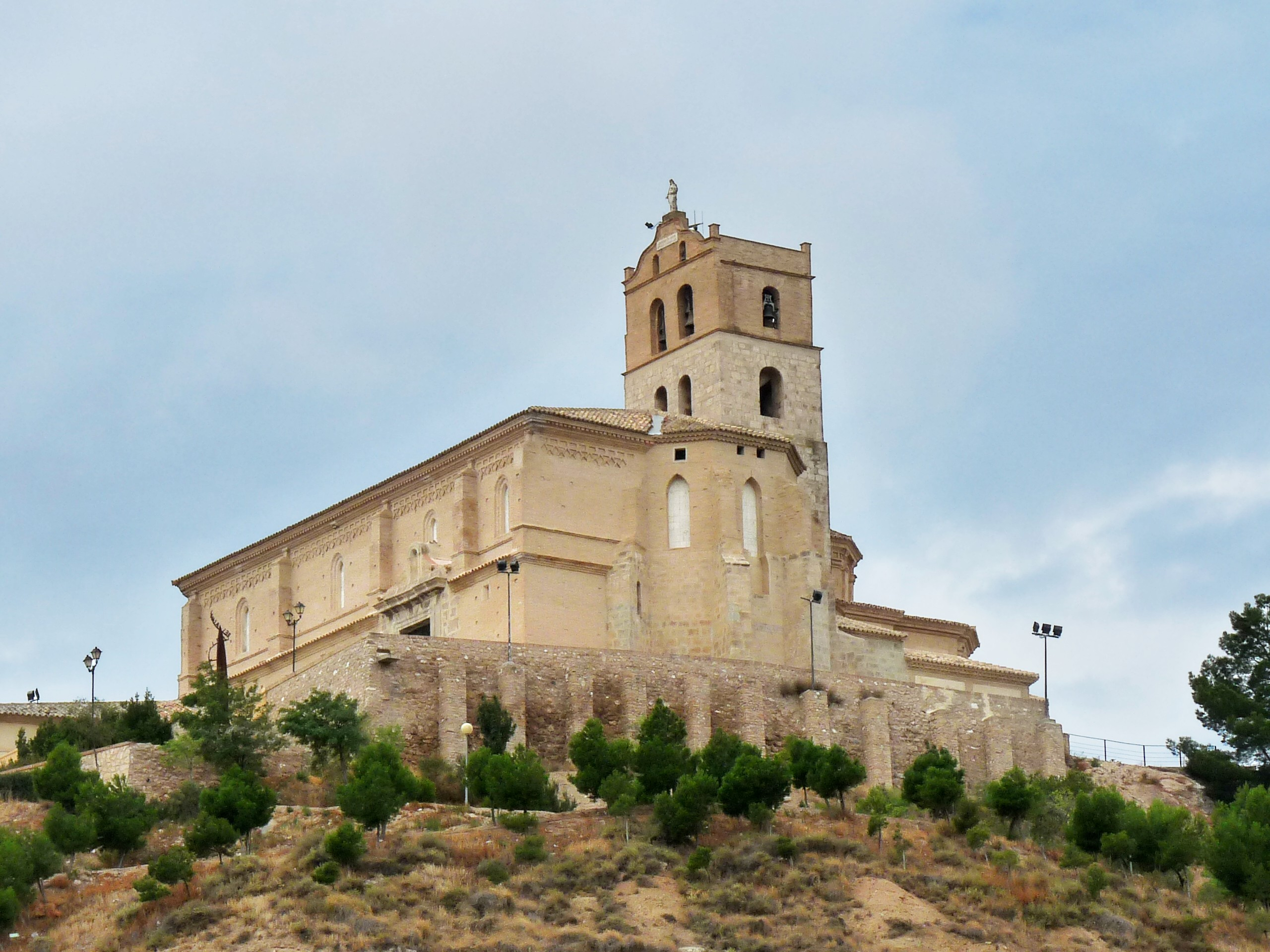 Magallón - Iglesia de San Lorenzo (s.XVI)